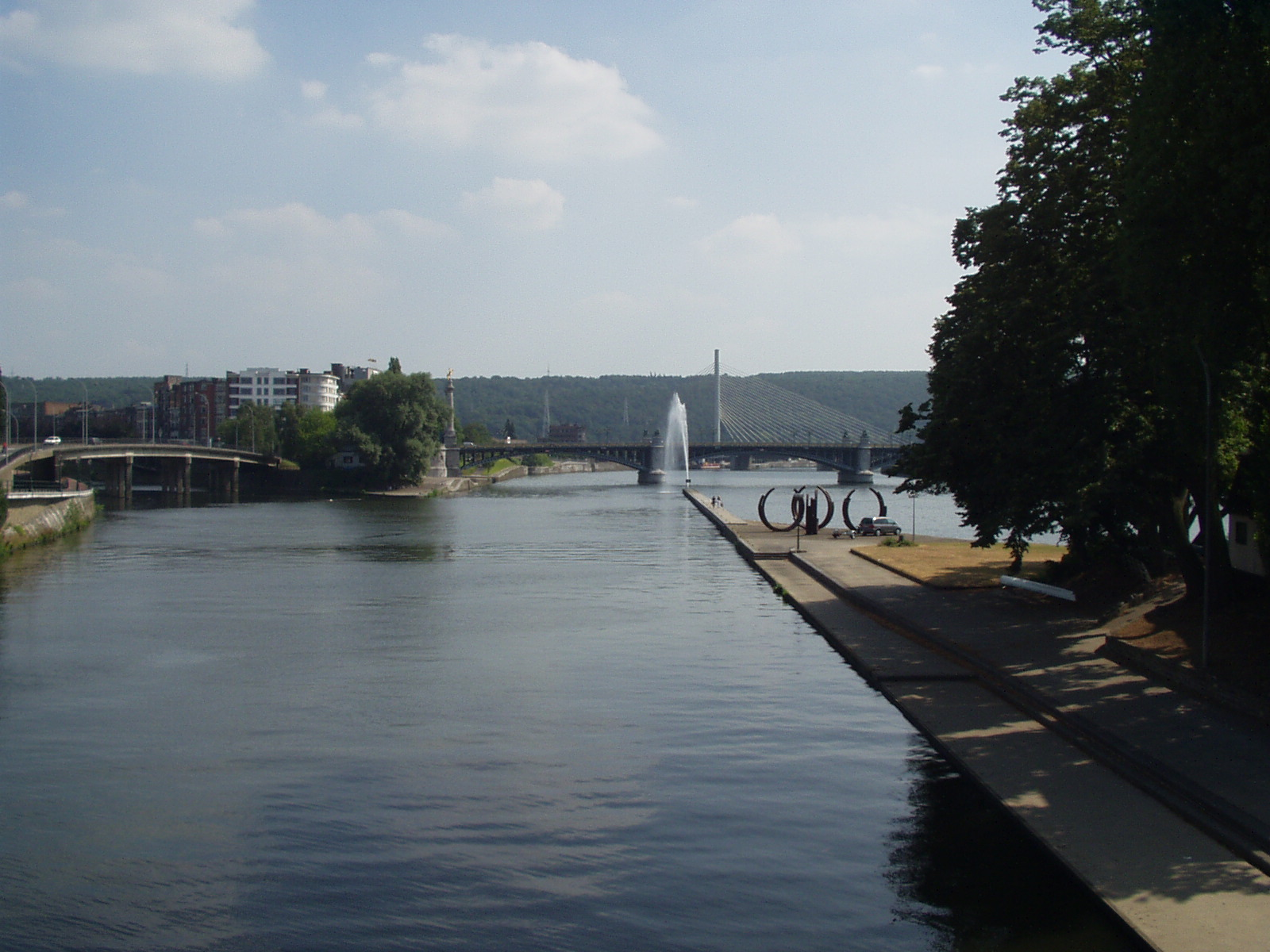 La Dérivation depuis la passerelle Mativa, vers le l'amont. Auteur: Julien Vandeburie